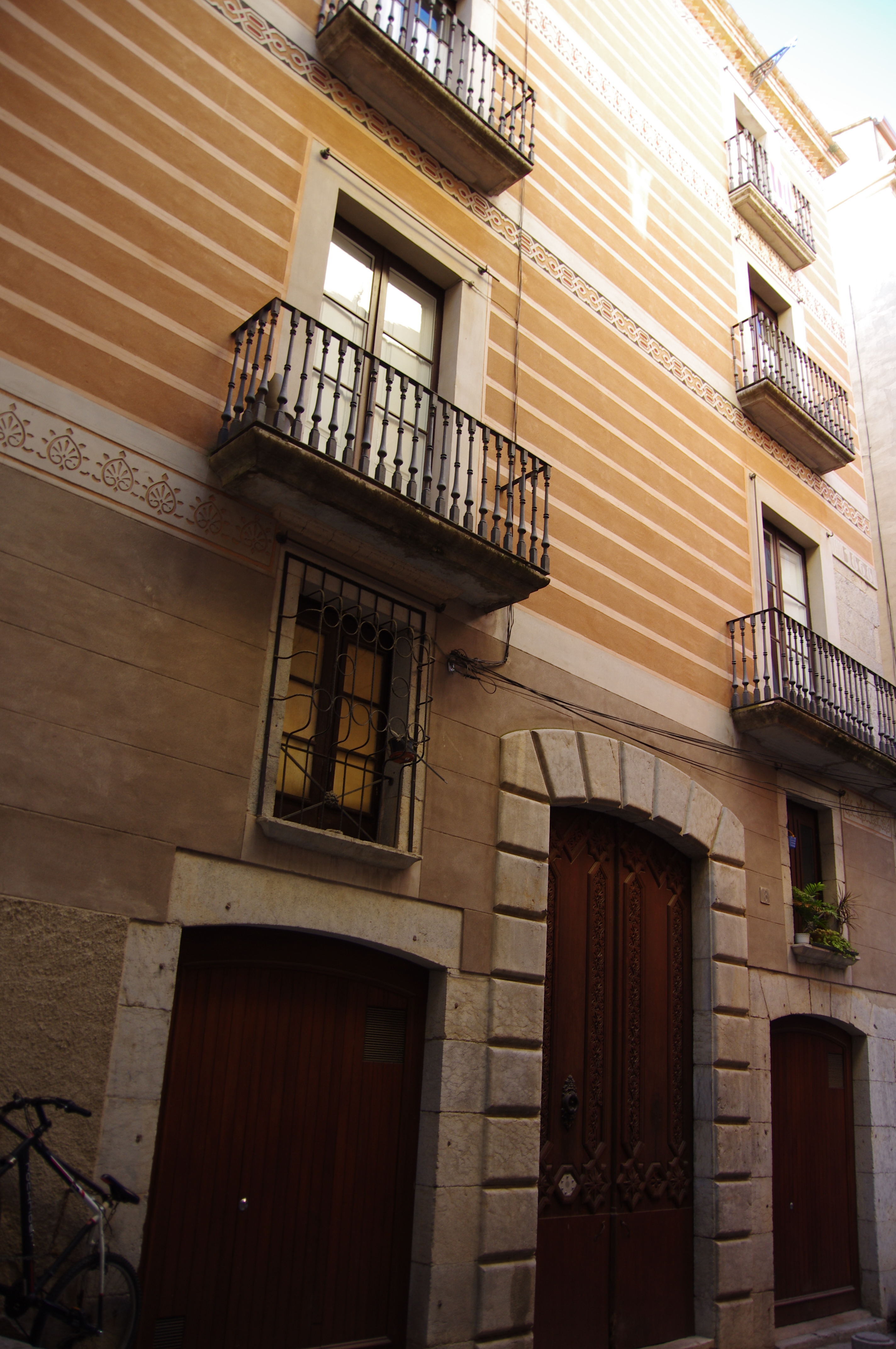 Habitatge plurifamiliar a la travessera Auriga, 8 (Girona)